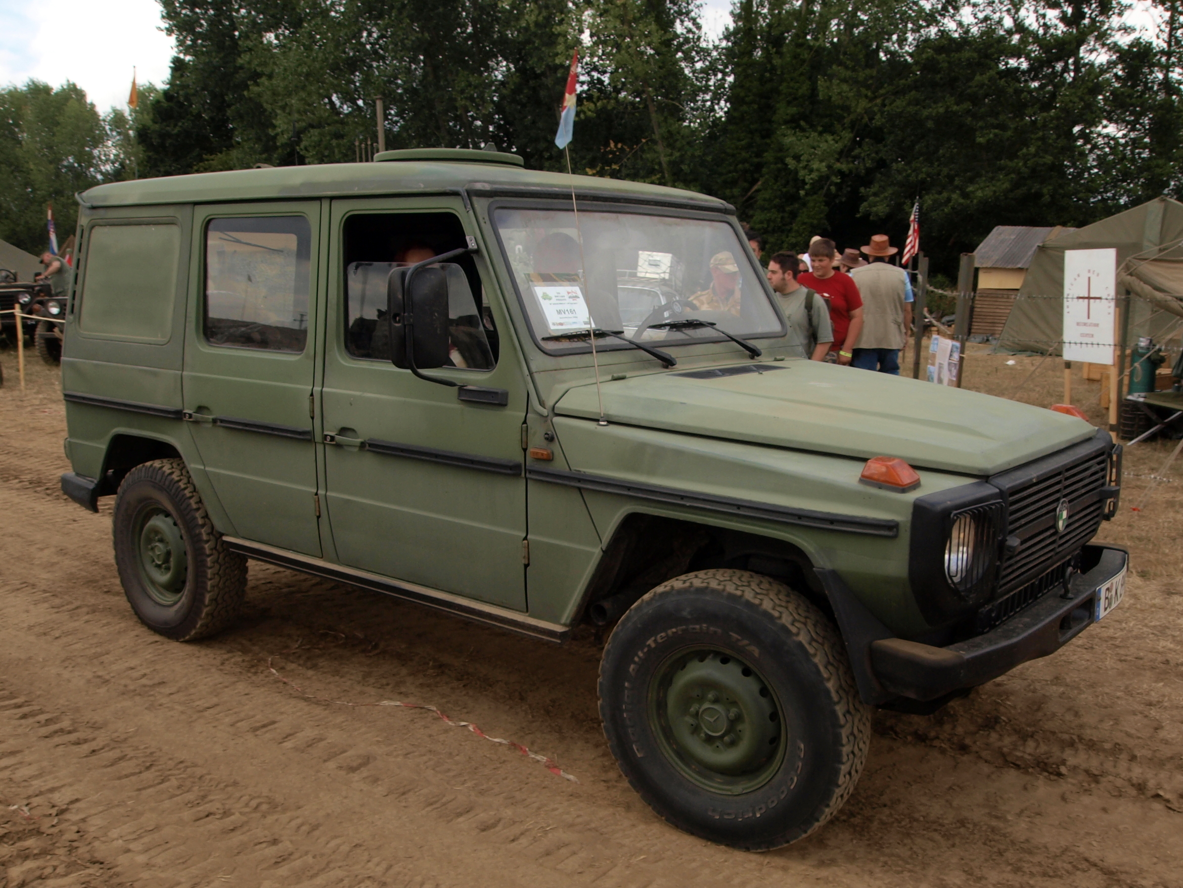 Mercedes Benz 280 GE (1985) Germany (owner Bernd Kieker)